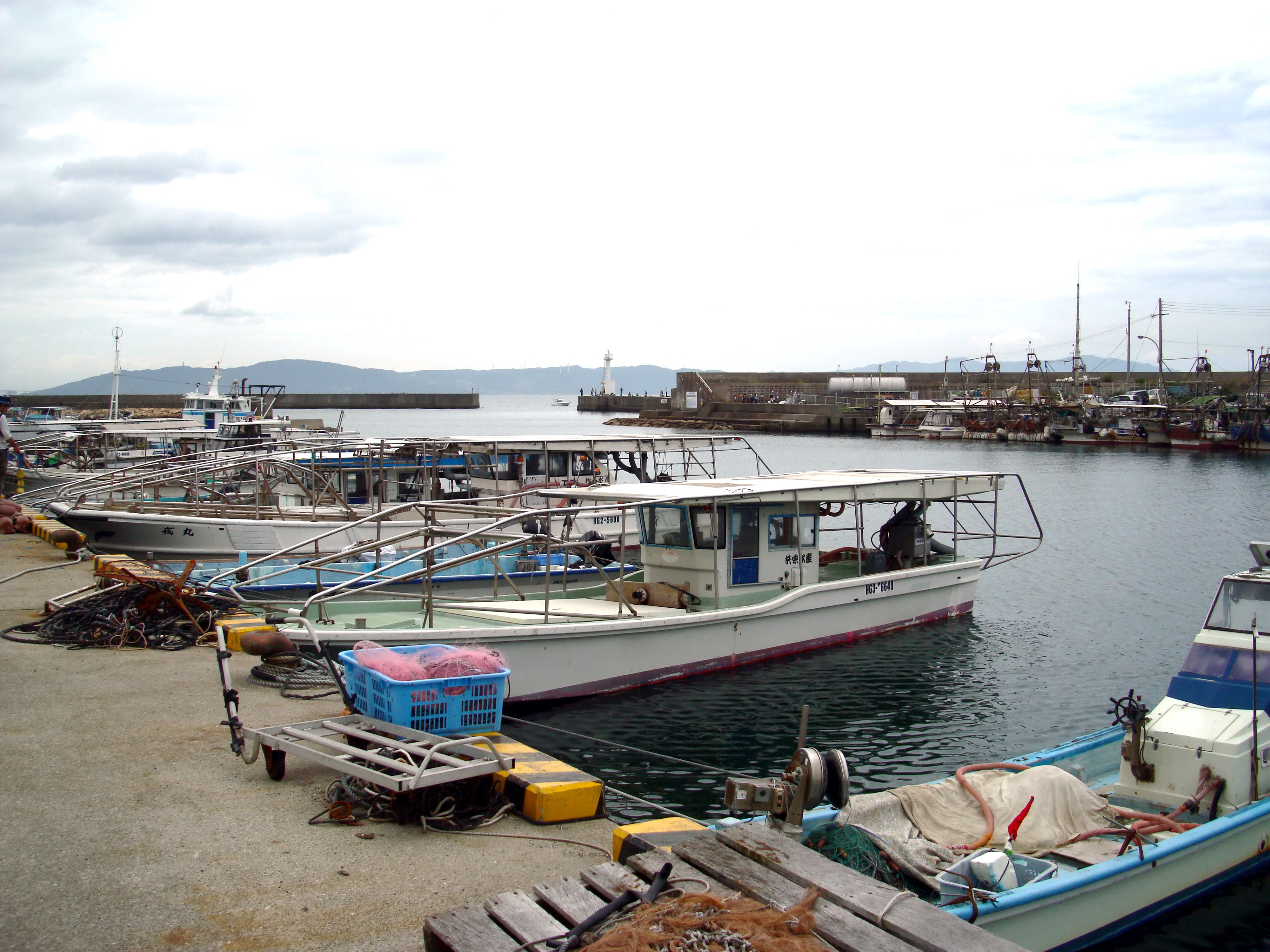 江井ヶ島港